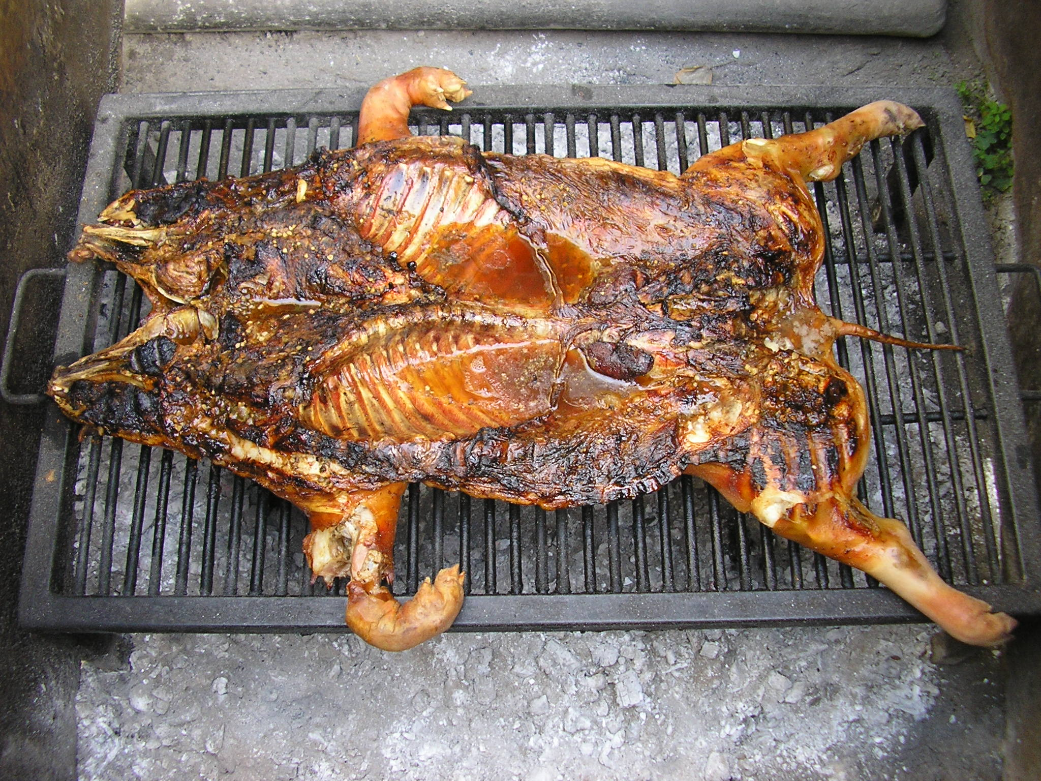 Lechon a la parrilla.